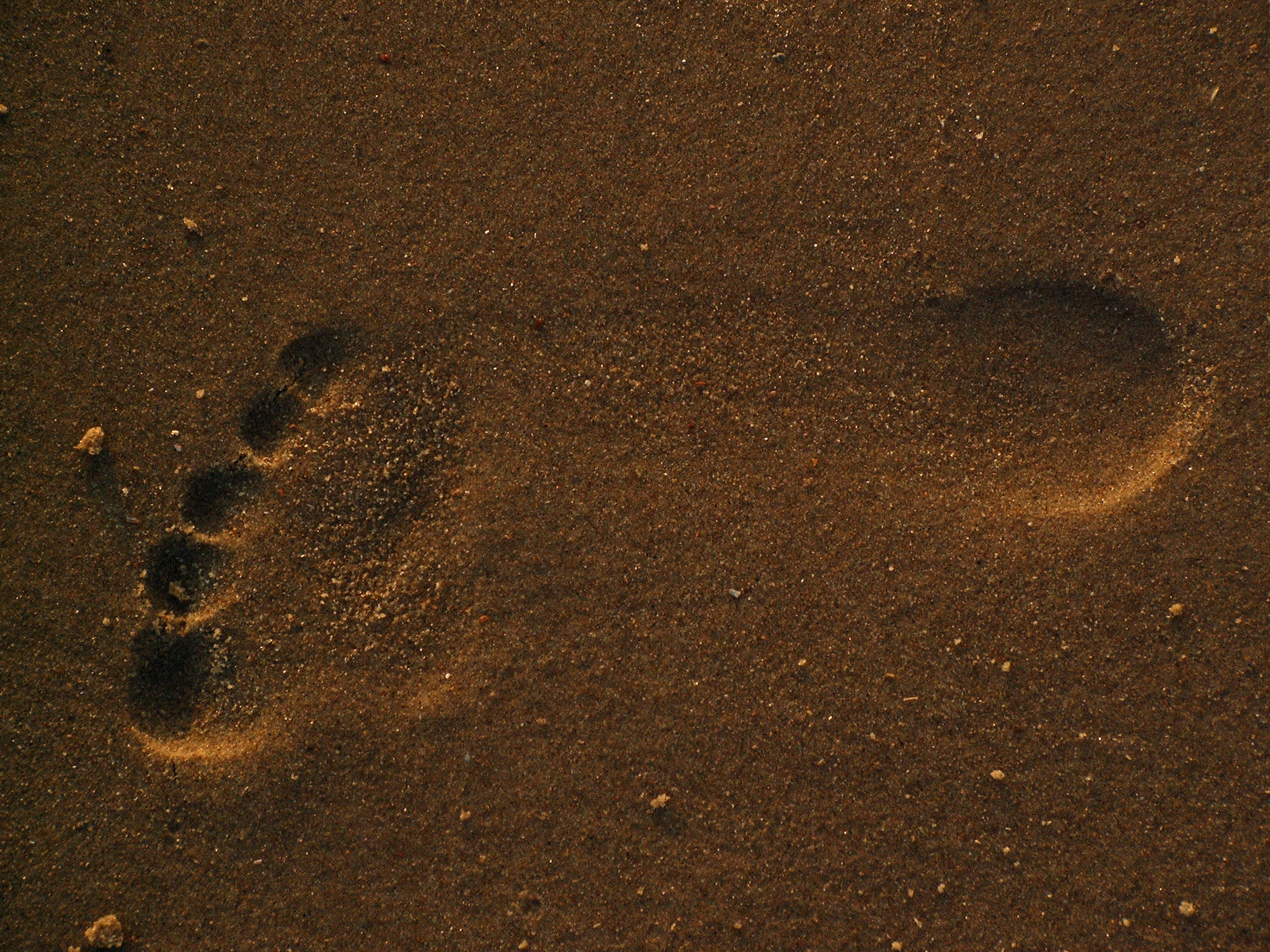 Spuren im Sand / Nordholland